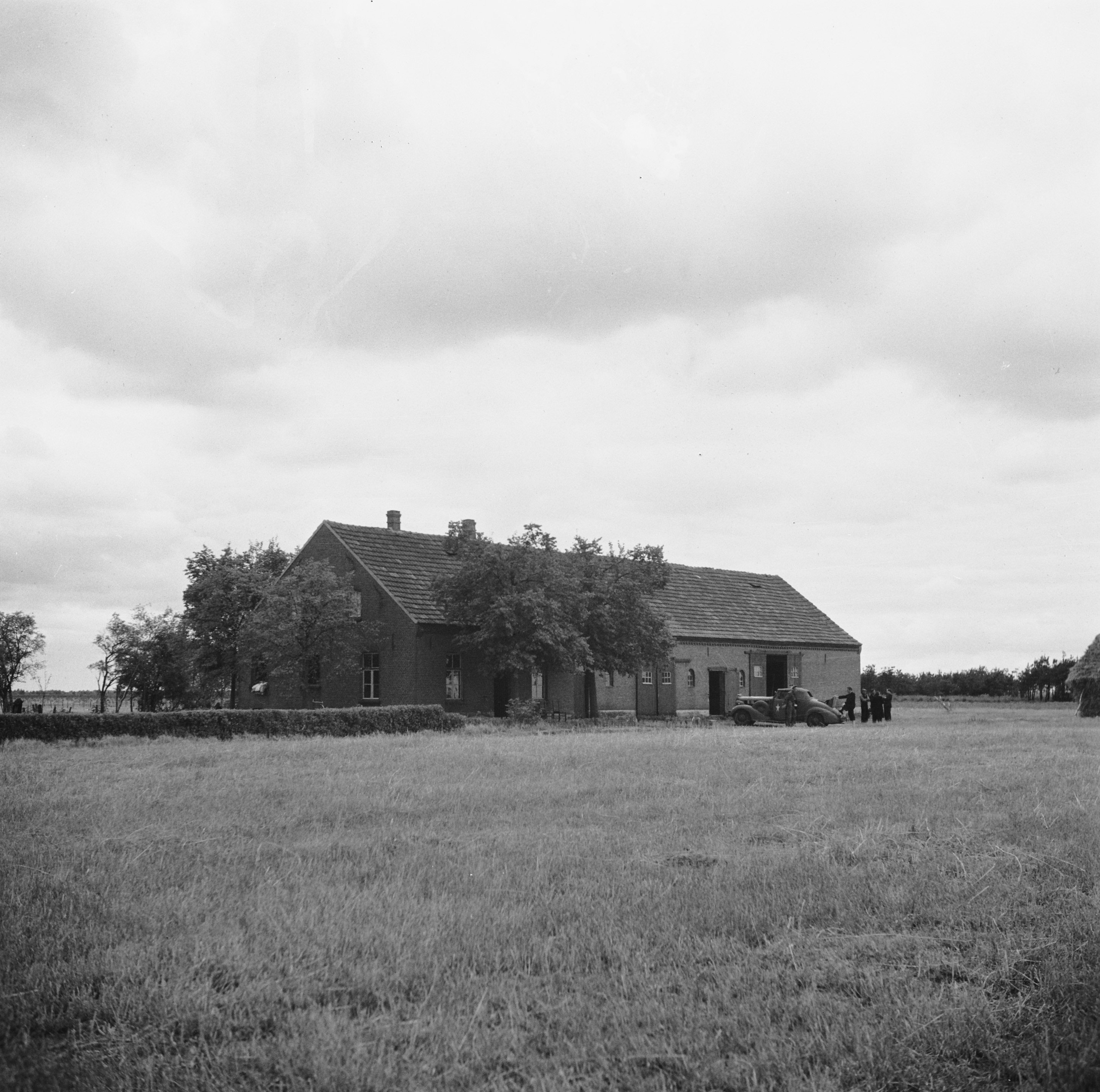 Collectie / Archief : Fotocollectie Anefo Reportage / Serie : Serie over de Limburgse families Smedts en Poels uit Horst die tijdens de Tweede Wereldoorlog ca. 300 geallieerde piloten (boven Nederland neergeschoten) in de boerderij "De Zwarte Plak" hielp verbergen en over grens naar Belgie wist te brengen. Beschrijving : tweede wereldoorlog, boerderijen, illegaliteit, onderduikers Datum : 1945 Locatie : Limburg Trefwoorden : boerderijen, illegaliteit, onderduikers, tweede wereldoorlog Fotograaf : Fotograaf Onbekend / Anefo, [onbekend] Auteursrechthebbende : Nationaal Archief Materiaalsoort : Negatief (zwart/wit) Nummer archiefinventaris : bekijk toegang 2.24.01.03 Bestanddeelnummer : 900-6248